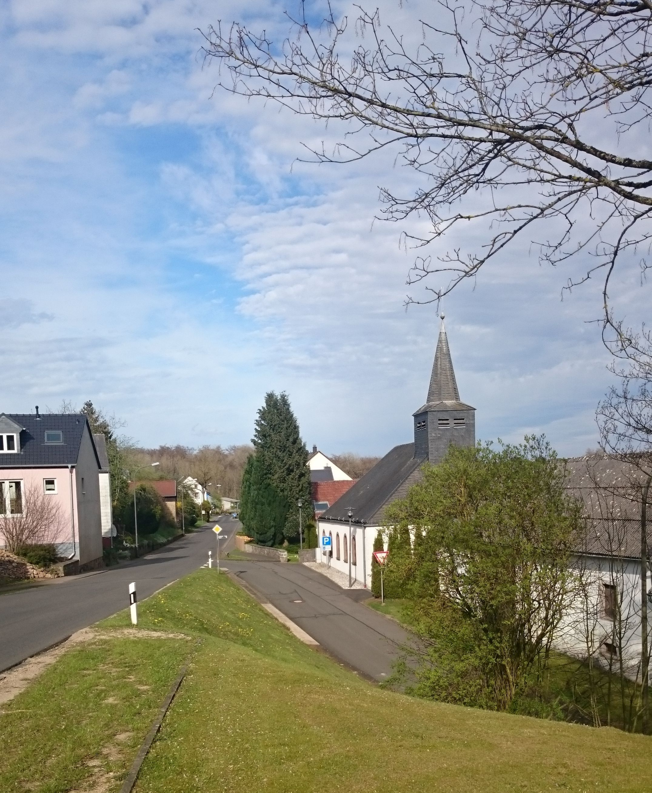 Feusdorf